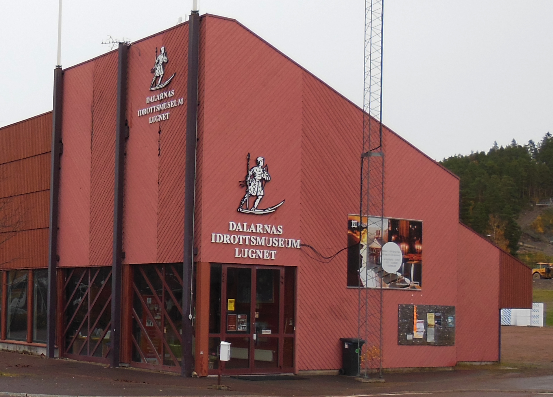 Dalarnas idrottsmuseums entré.